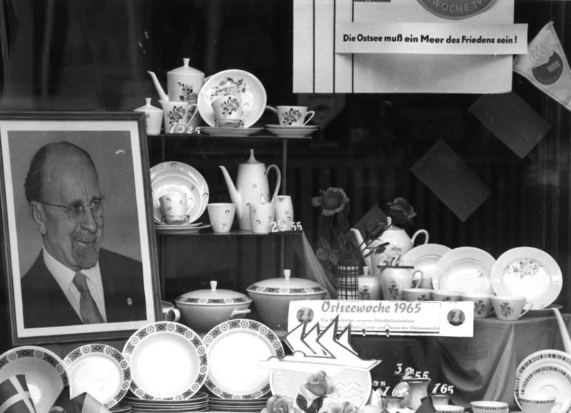 Wismar Ulbricht im Porzellanladen